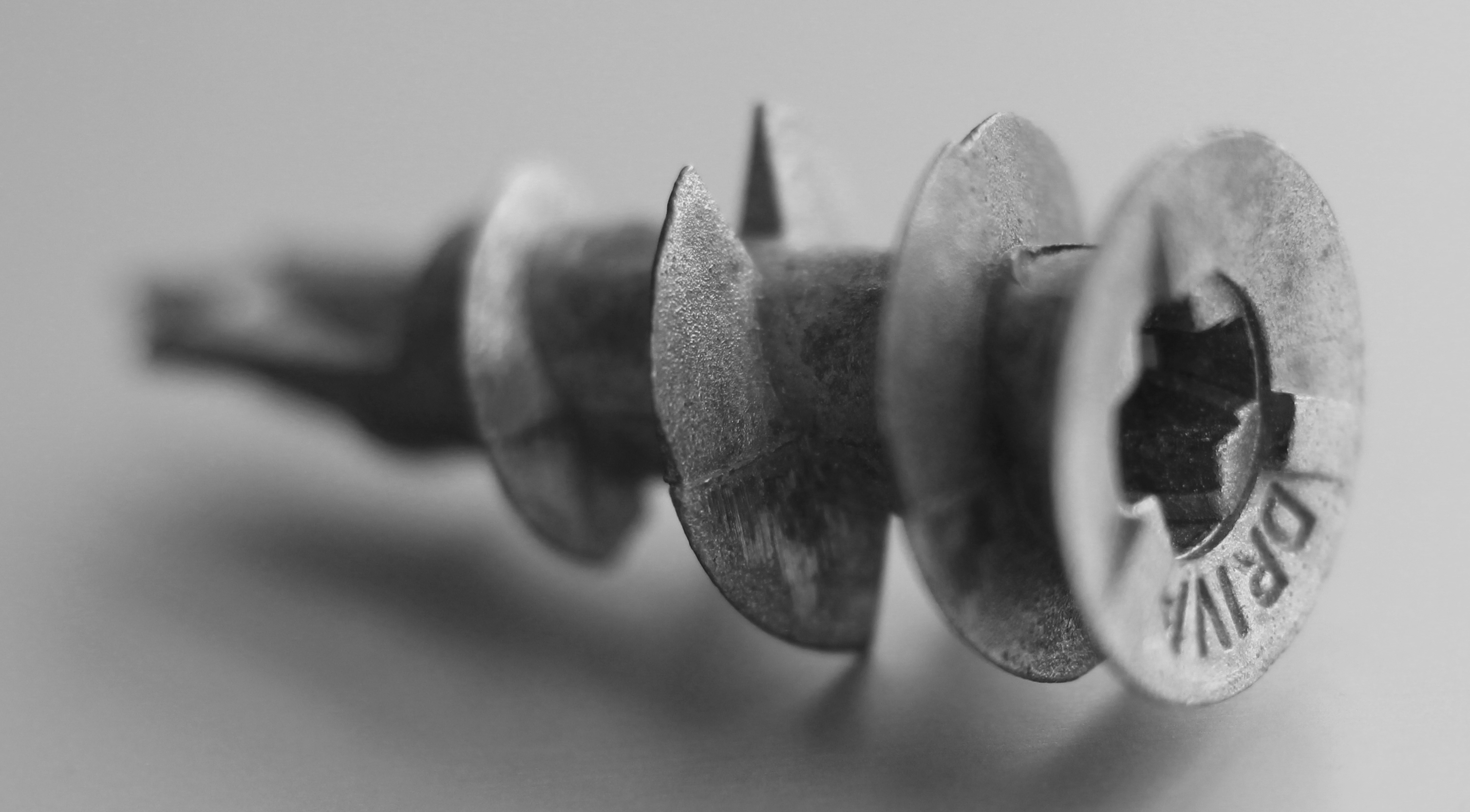 Bildinhalt: Ein Gipskartondübel, auch Rigipsdübel genannt, in schwarz-weiß Aufnahmeort: Frankfurt am Main, Deutschland